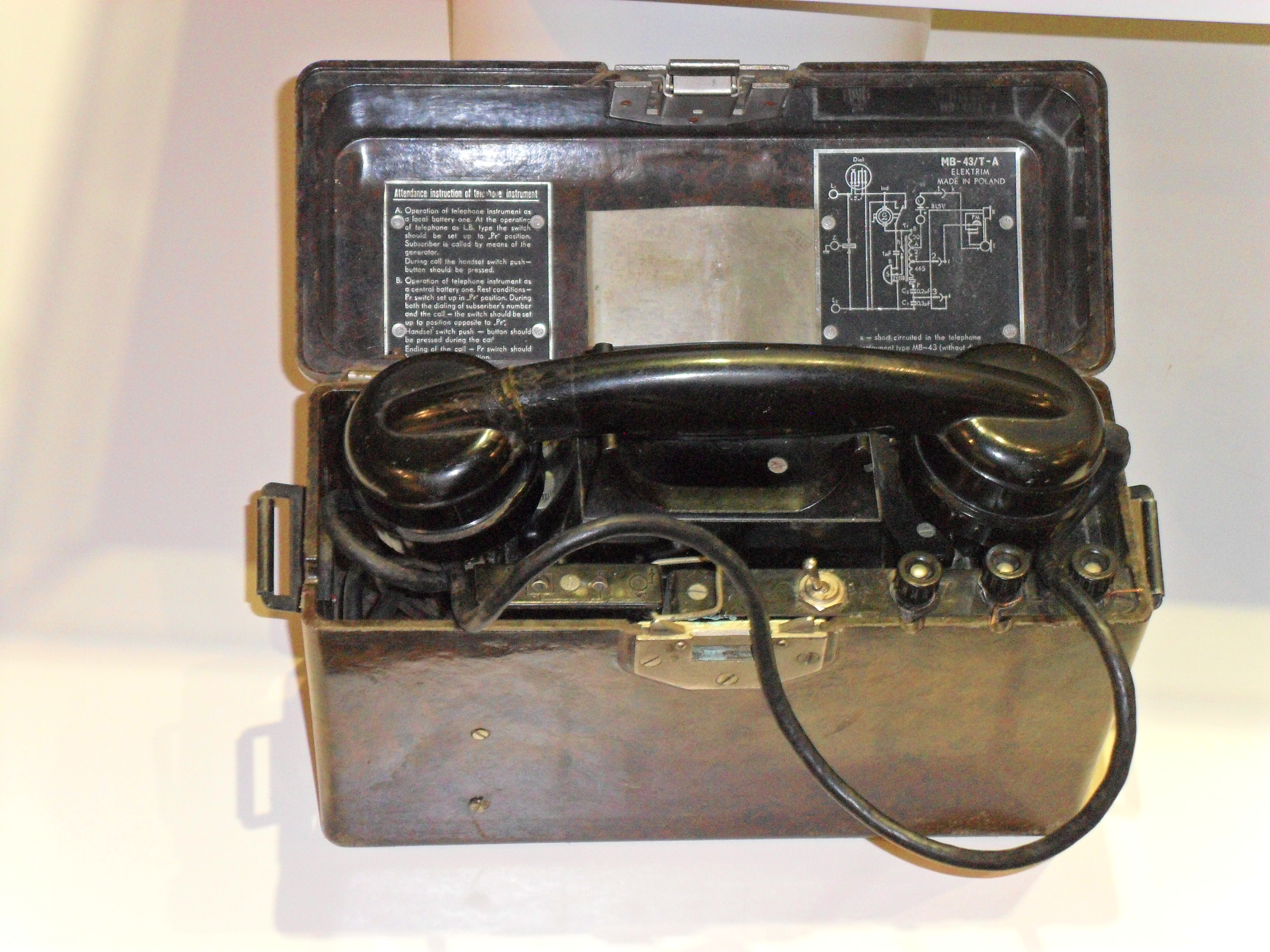 Samsun Kent Müzesi'nde sergilenen bir cephe telefonu.